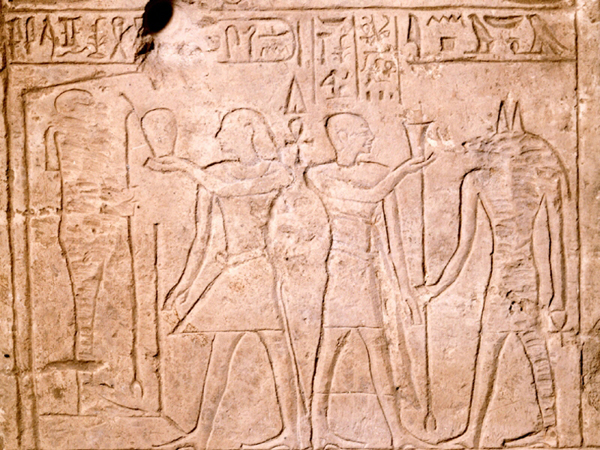 Estela de Nebsumenu (Segundo Periodo Intermedio). Número de inventario: 1999-99-4.